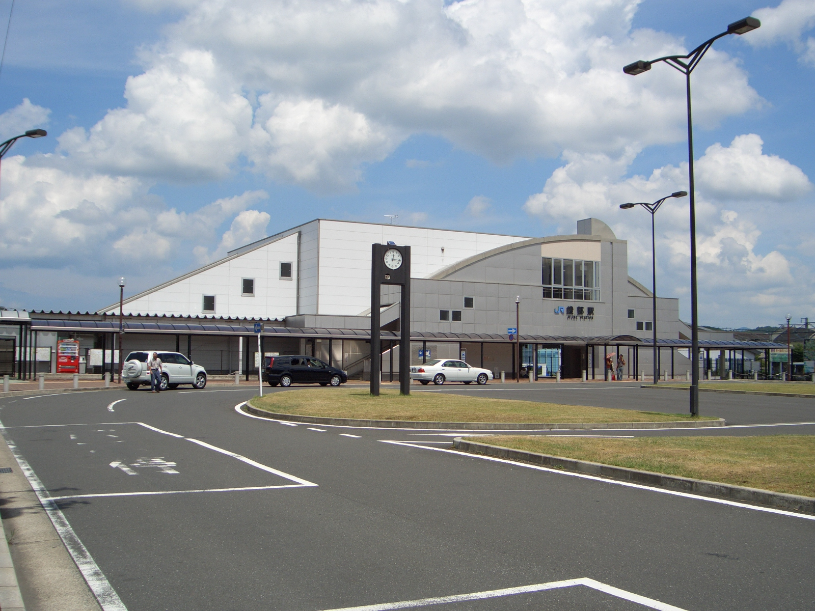 西日本旅客鉄道山陰本線・舞鶴線 綾部駅南口